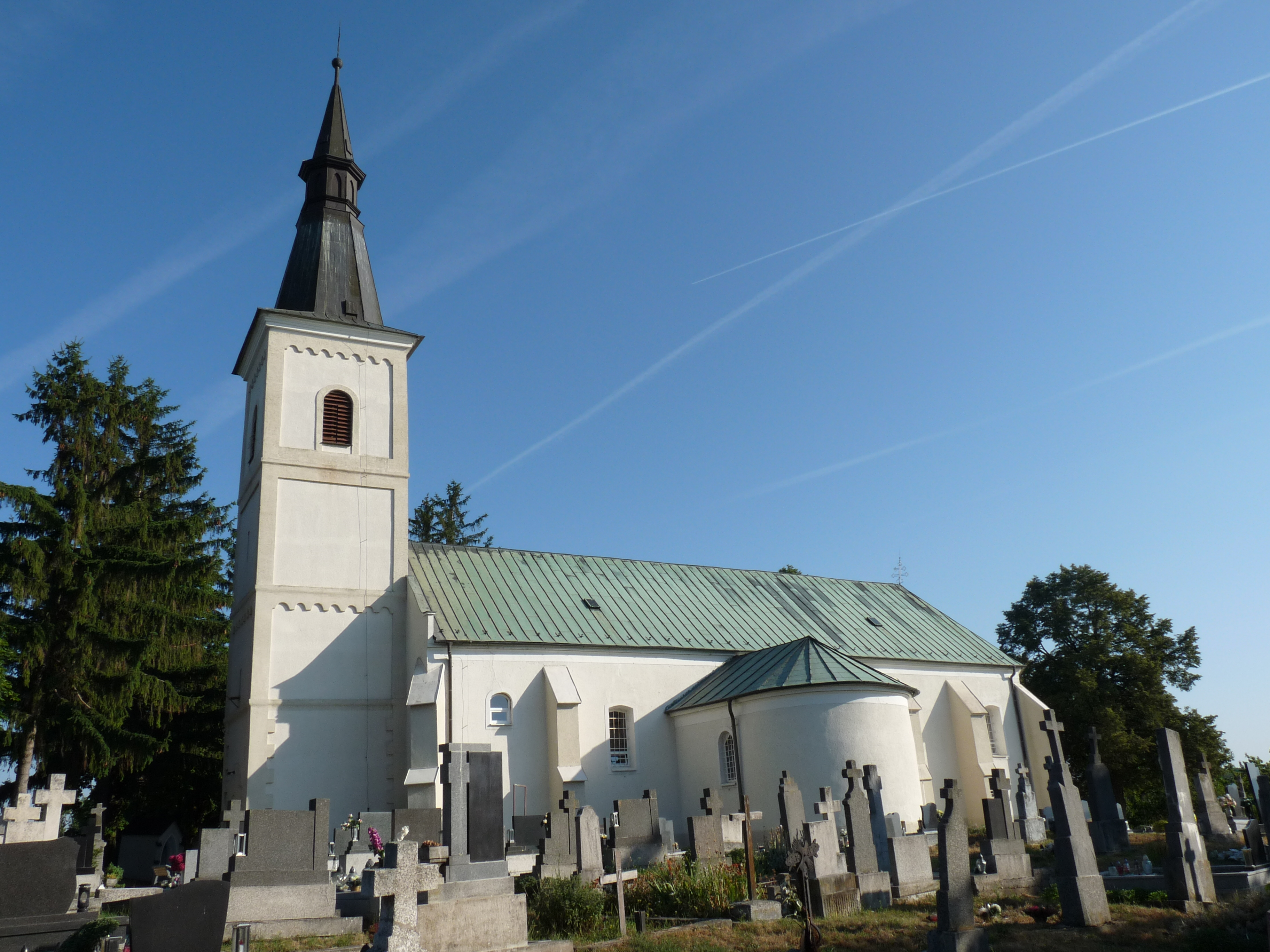 Kostol vo Veľkých Kostoľanoch